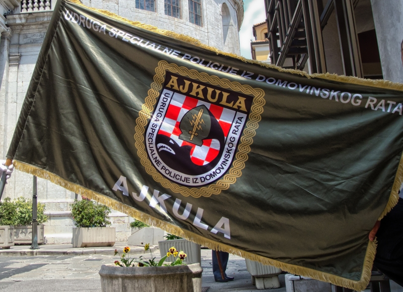 Povorka hrvatskog ponosa i slave; Dan državnosti u Rijeci, Most hrvatskih branitelja iz Domovinskog rata